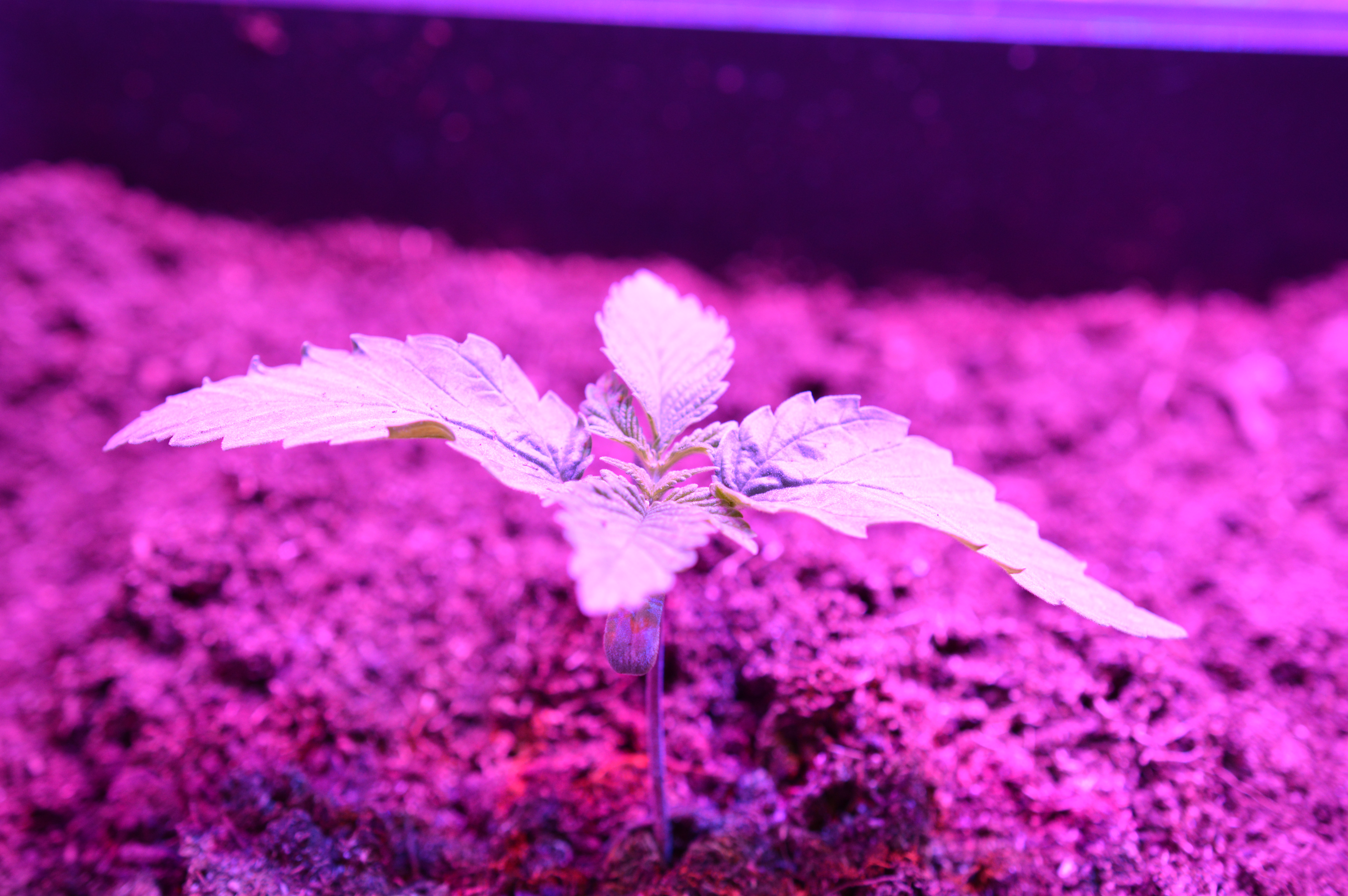 LED seedling